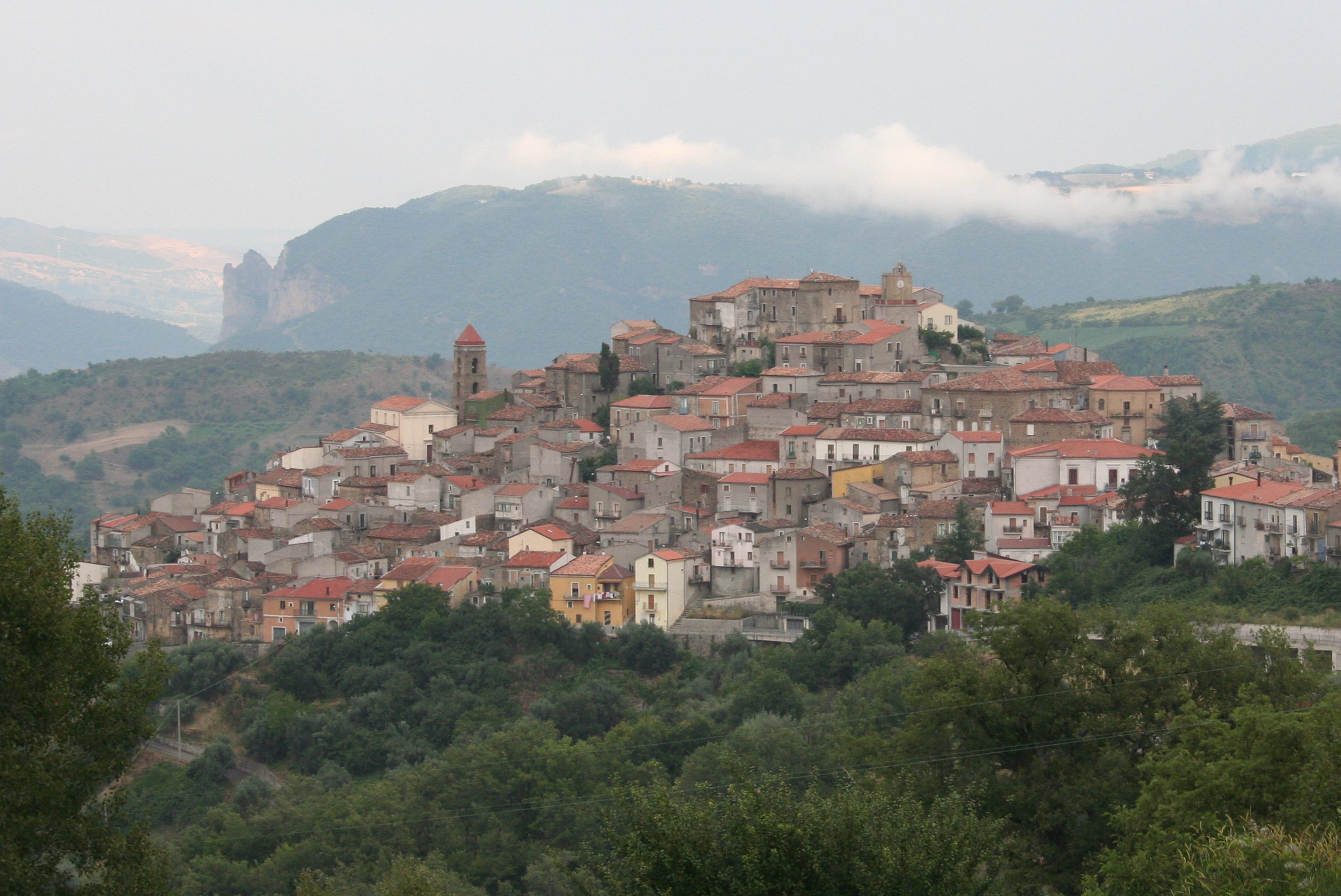 (C) Michele "O-Zone" Pinassi - San Martino d'Agri, sulle pendici del Monte Raparo. Foto scattata in Luglio 2006